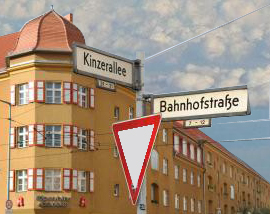 Kinzerallee / Bahnhofstraße in Berlin-Köpenick